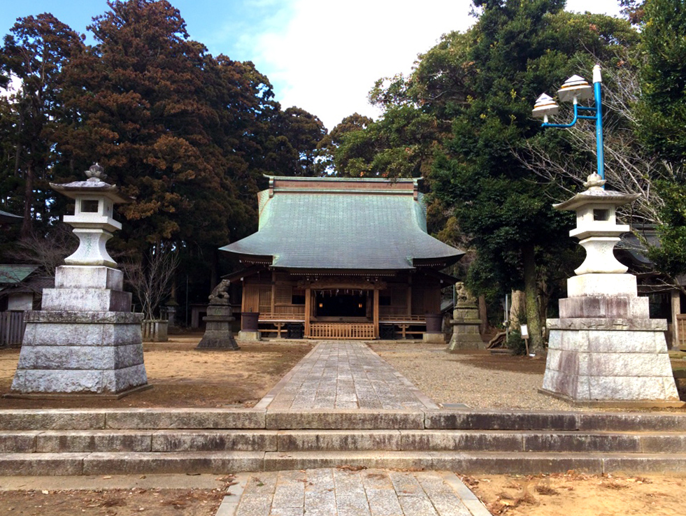 香取郡東庄町・東大社